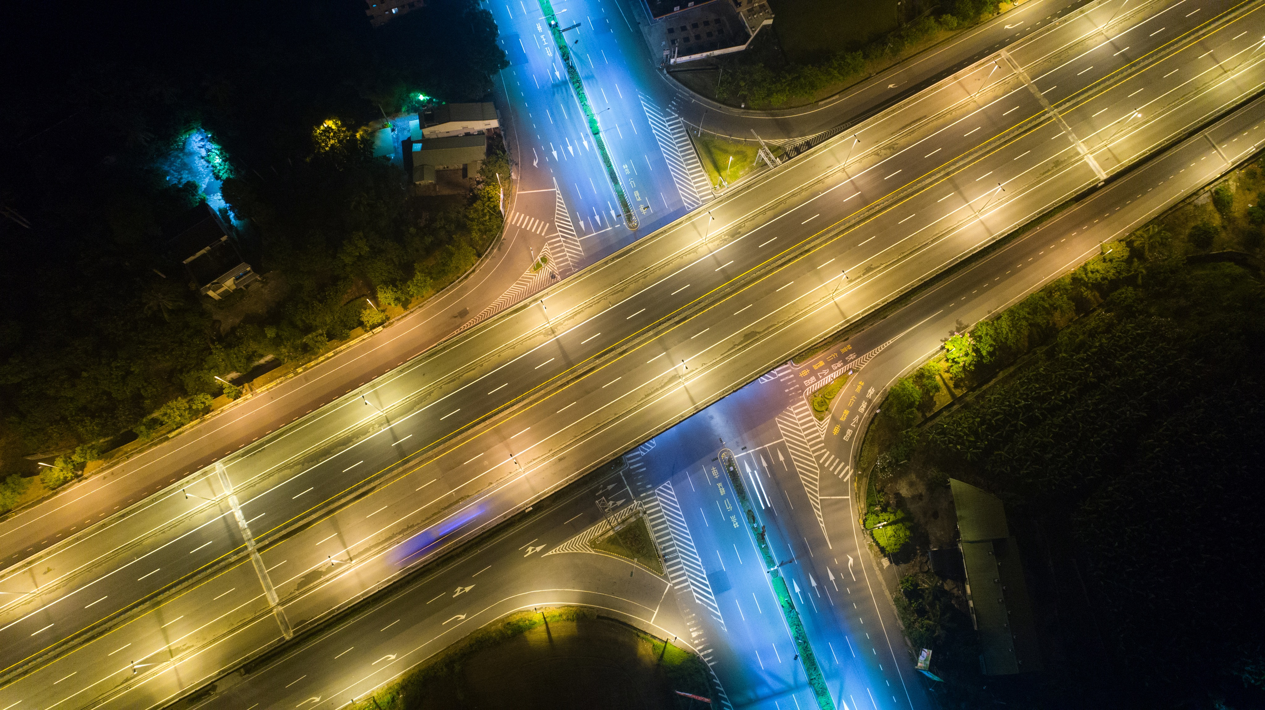 半夜的東西向快速道路玉井線與縱貫公路